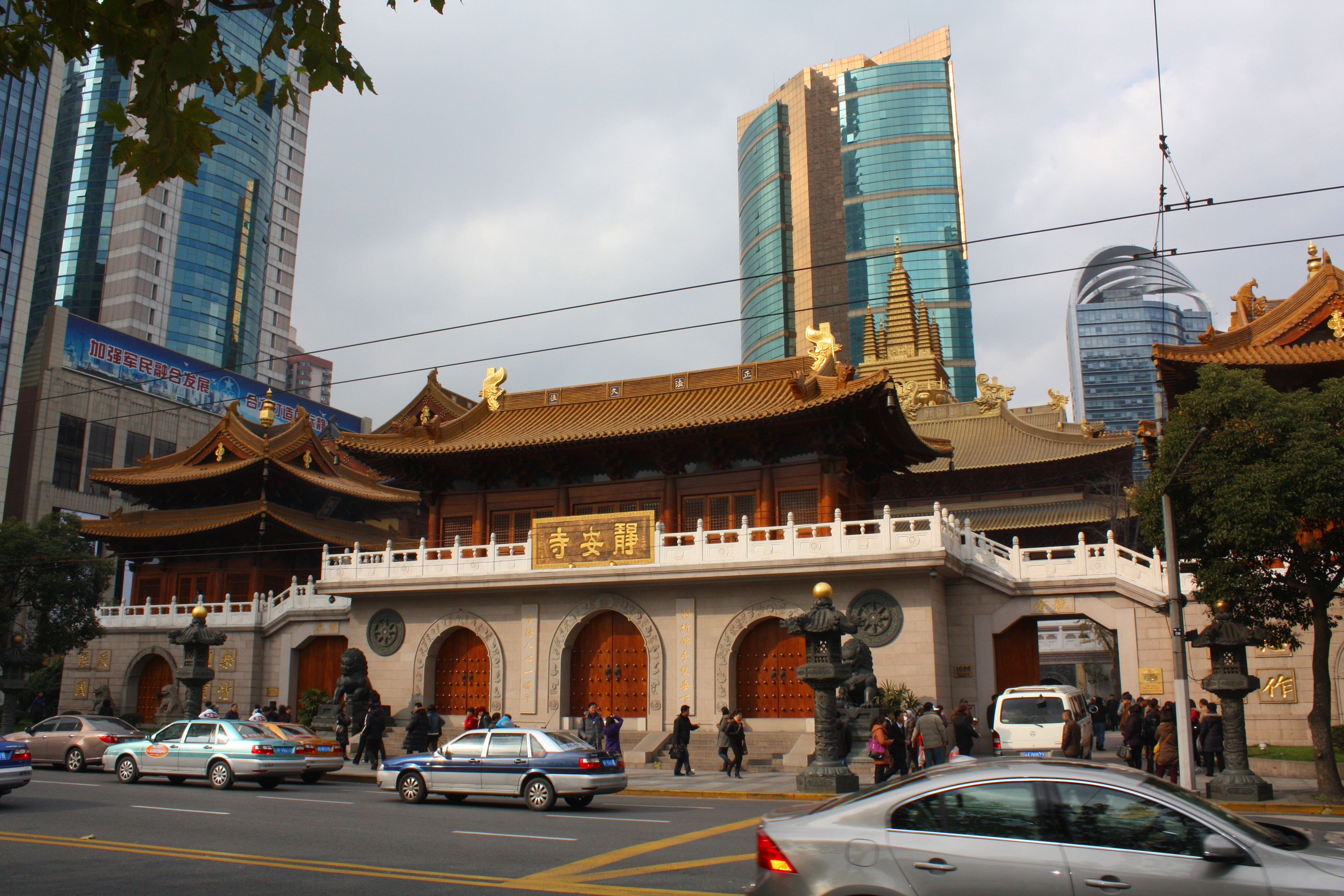 siehe [1]